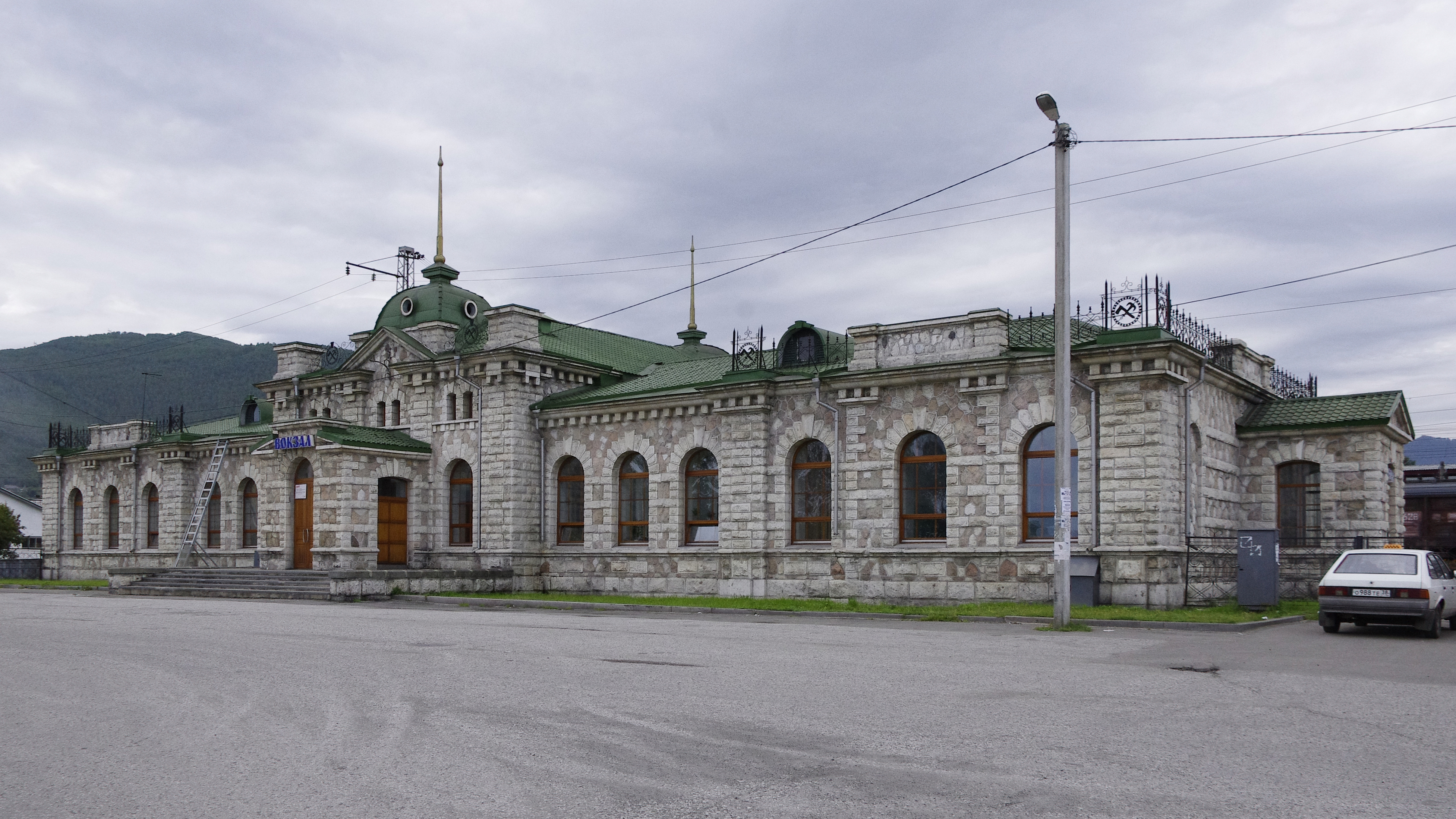 Lato 2013.